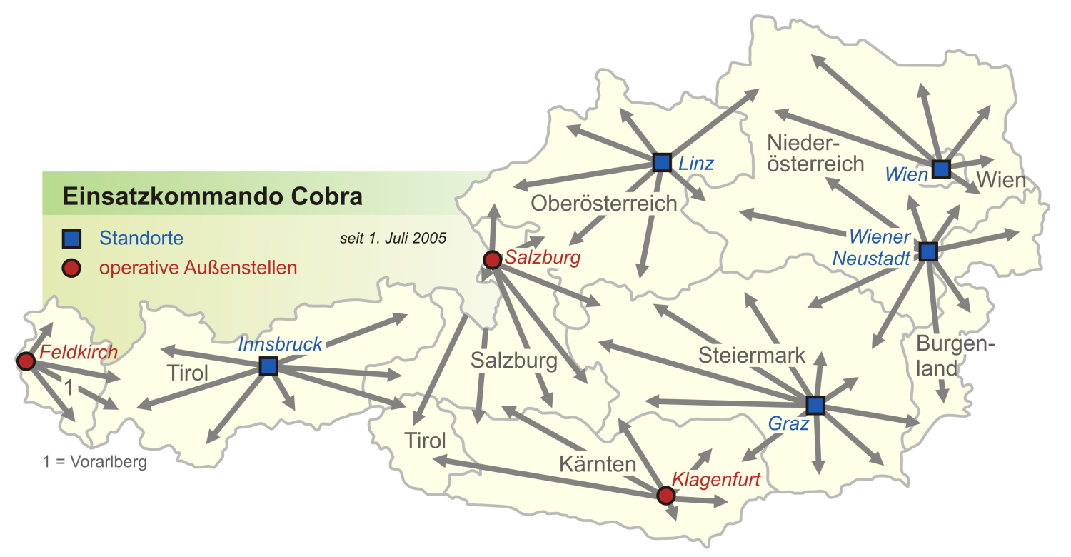 Karte des Einsatzkommandos Cobra, der österreichischen Antiterrorspezialeinheit